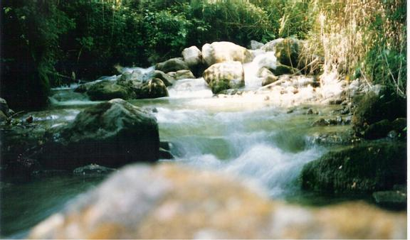 Francesco Stuppello, Tortora (CS), Fiumarella di Tortora in località Cardio